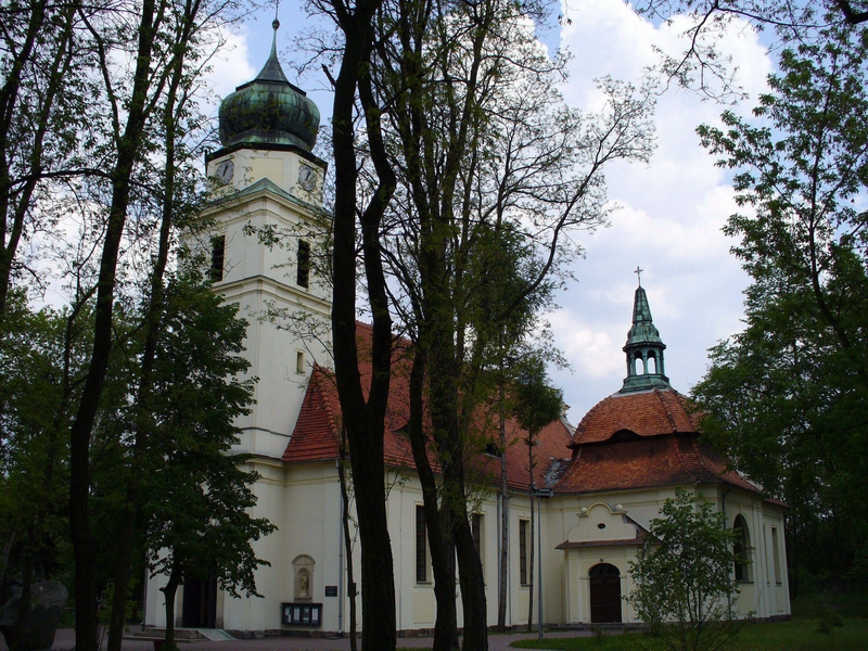 Kościół pw. Św. Stanisława, Biskupa i Męczennika (wybudowany w 1912 r.), Solec Kujawski, Polska. Data wykonania zdjęcia: 13.05.2006 r. Autor zdjęcia: Maciej McLion Lewicki, Bydgoszcz, Polska Opis skorygował: Tomasz Wiśniewski, Solec Kujawski, Polska.